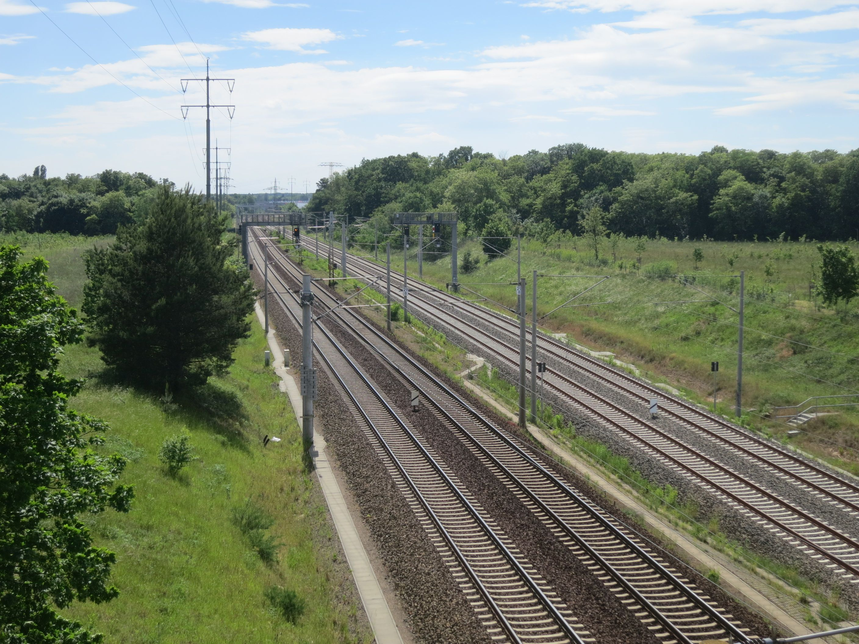 Abzw. Glasower Damm Ost: Fernbahnstrecke zum Flughafen BER, rechts: Berliner Außenring zum alten Bahnhof Schönefeld